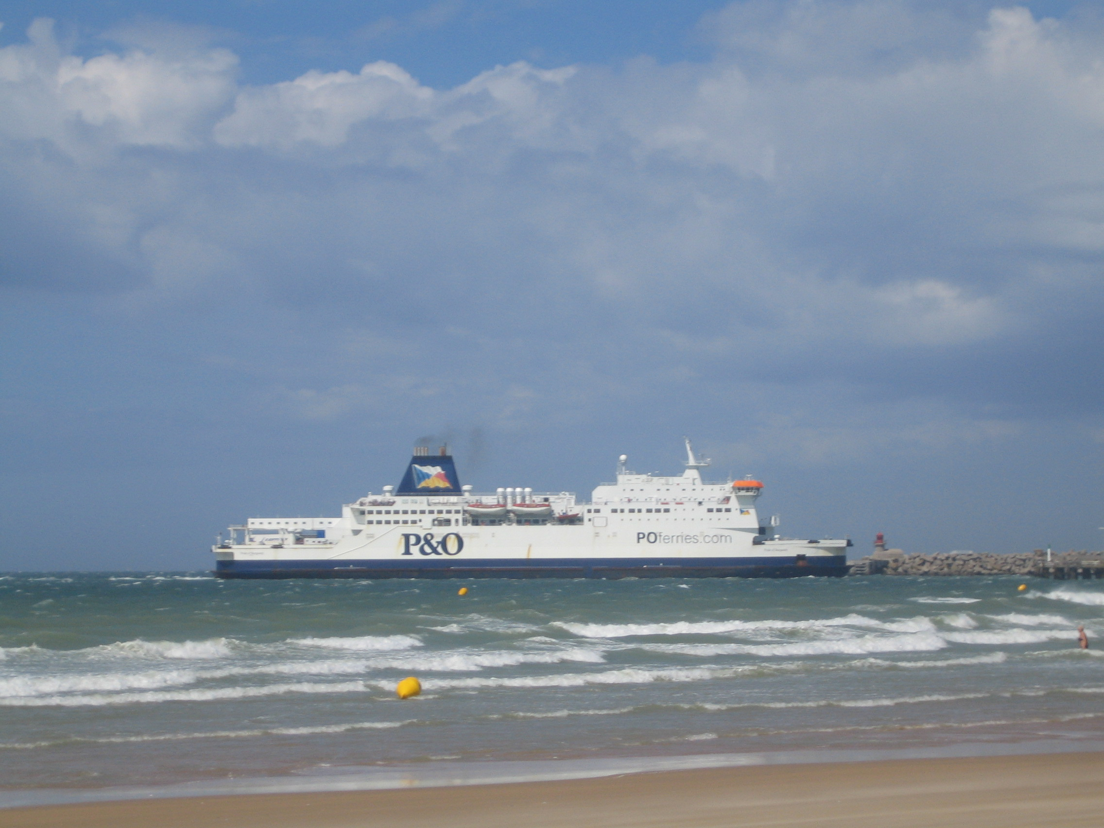 Calais.